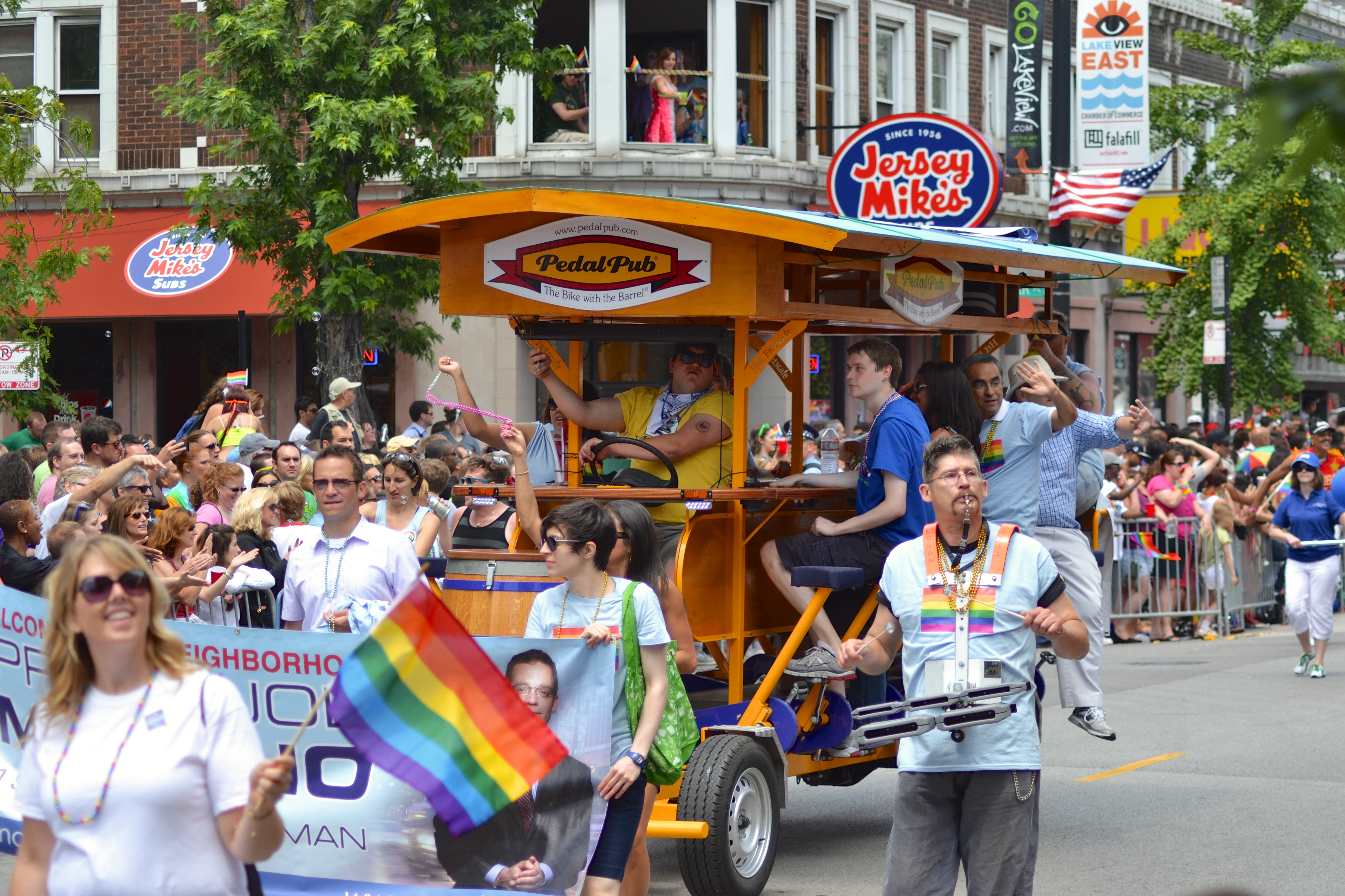 Pedal Pub